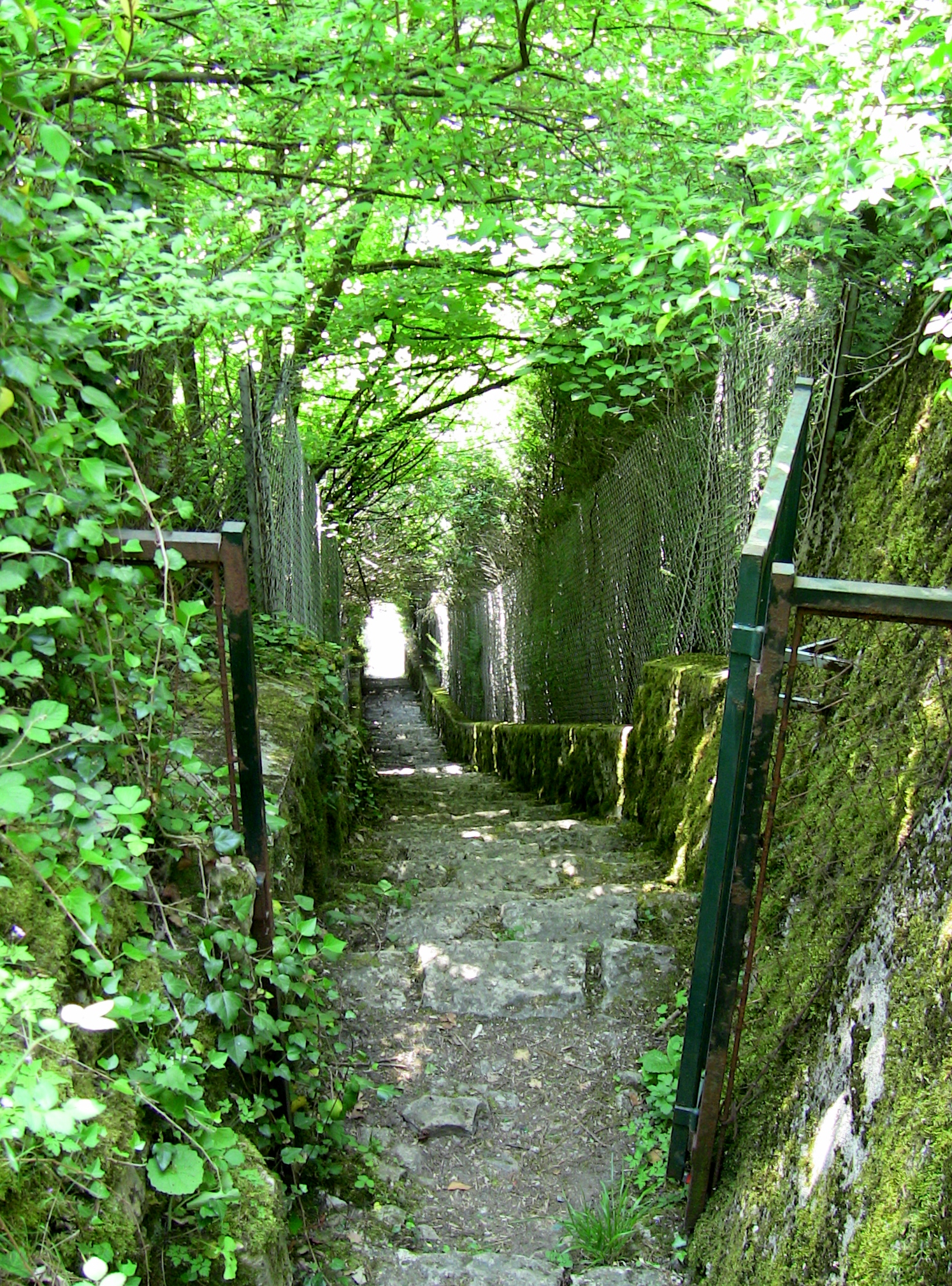 L'escalier faisant le lien entre le fort de Beauregard et la rivière du Doubs, à Besançon (Doubs, France).